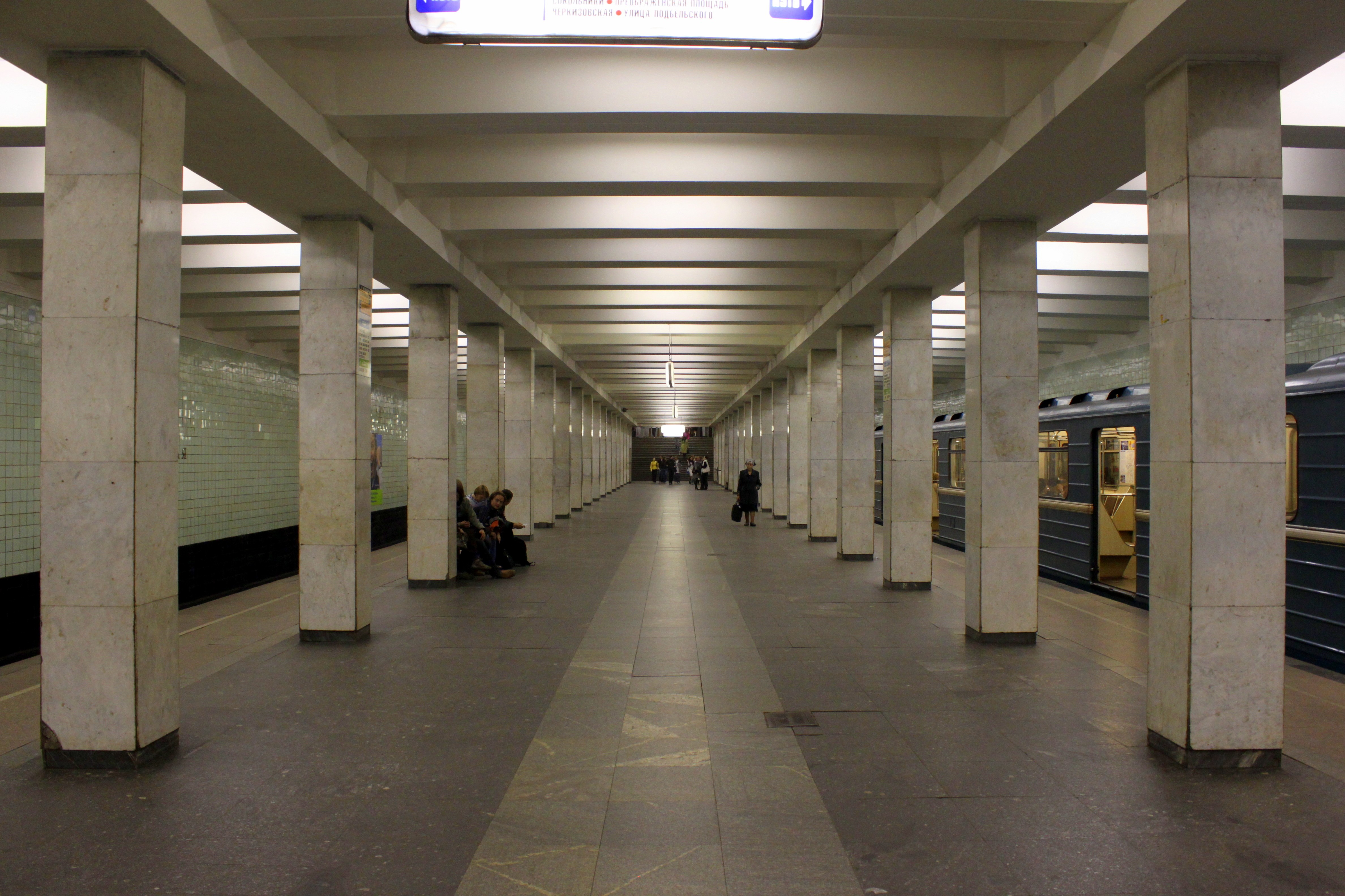 Станция московского метрополитена "Юго-Западная"